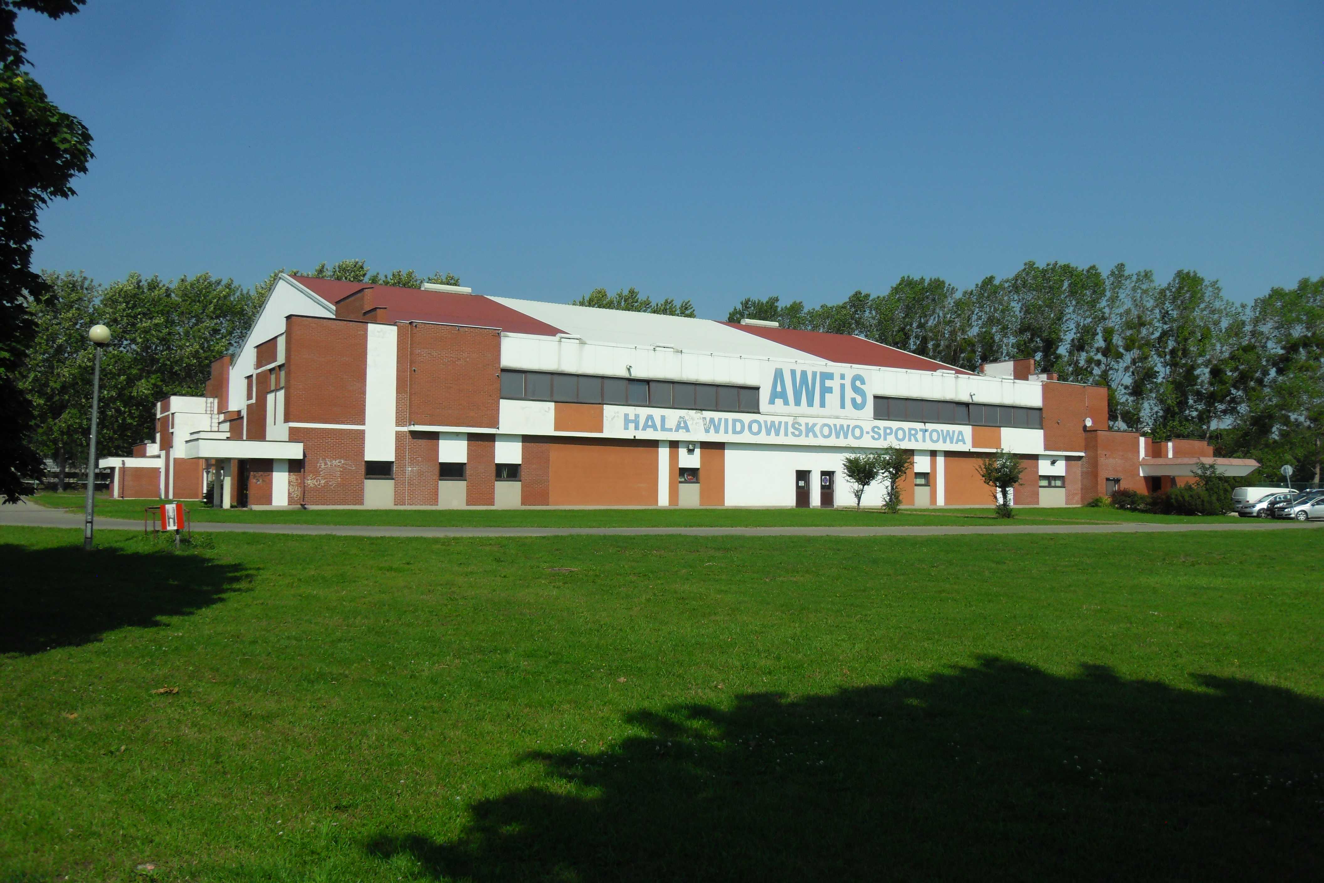 Gdańsk Oliwa. Akademia Wychowania Fizycznego i Sportu, Hala Widowiskowo-Sportowa.